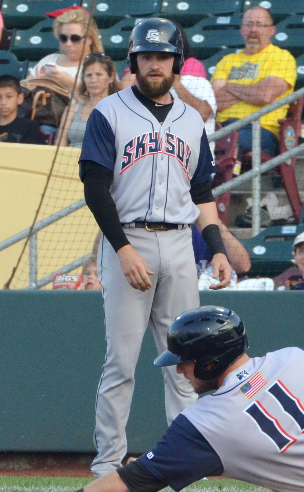 Ben Paulsen